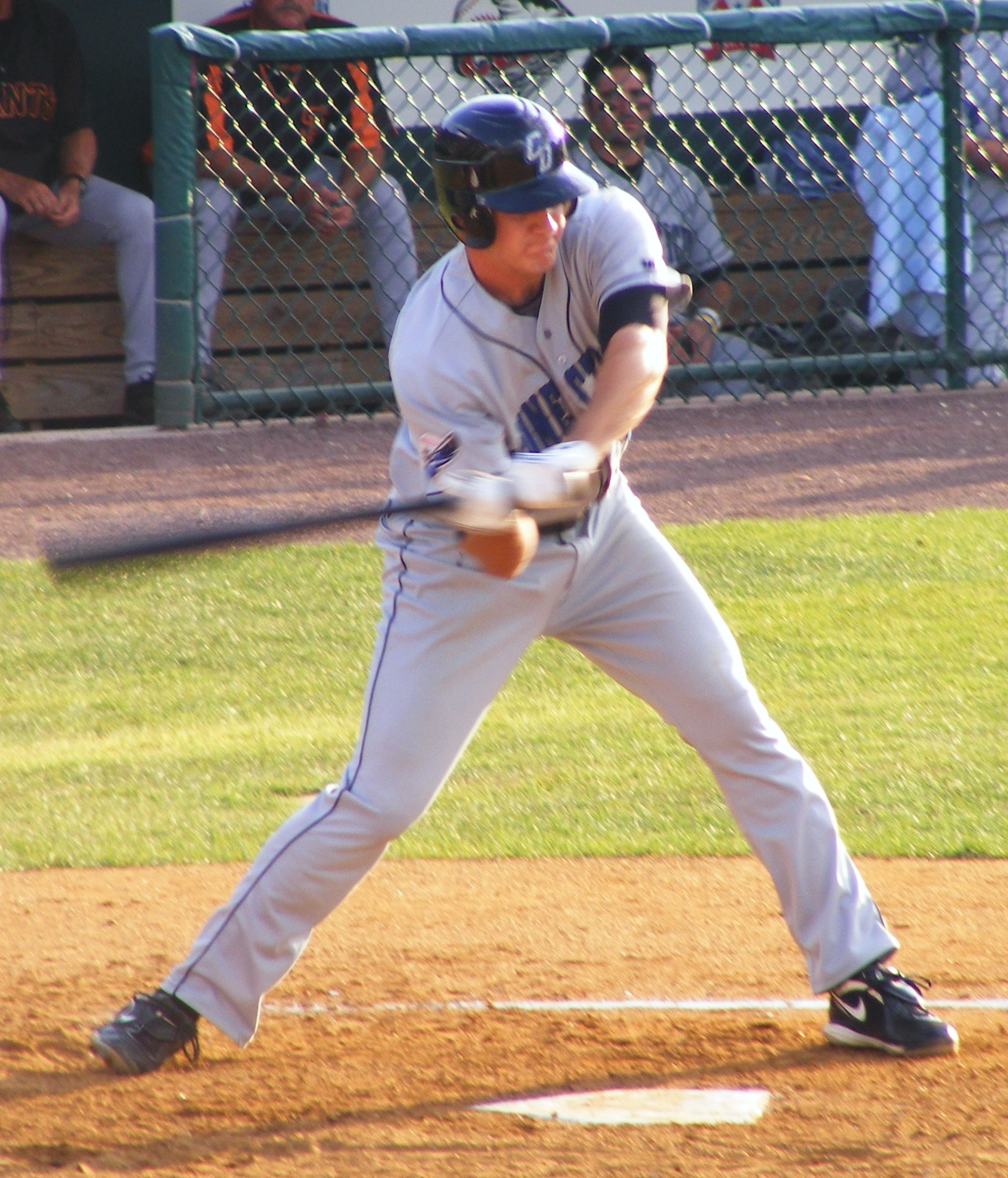 Brett Pill.